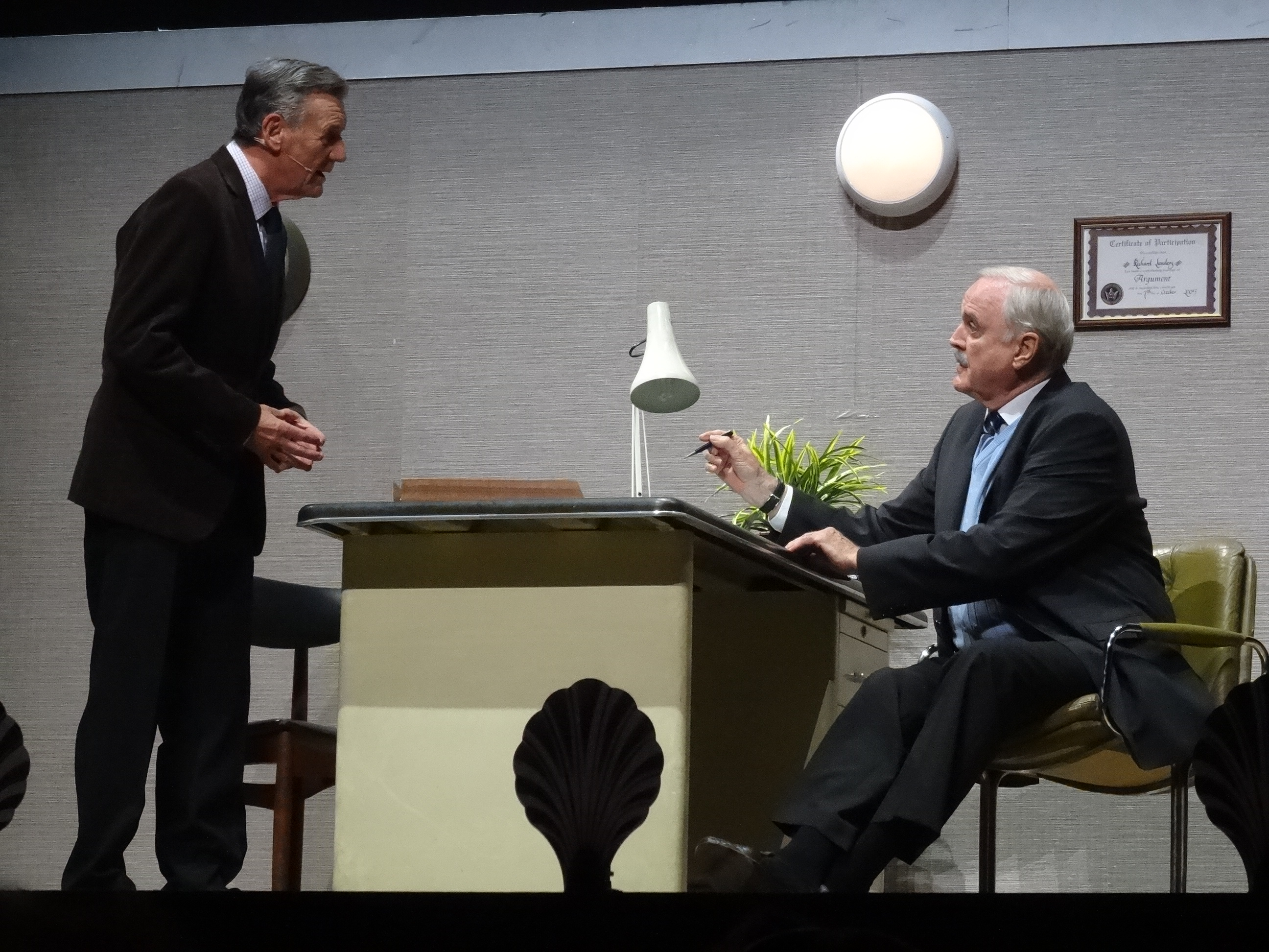 Photo 02-07-14 13 00 13